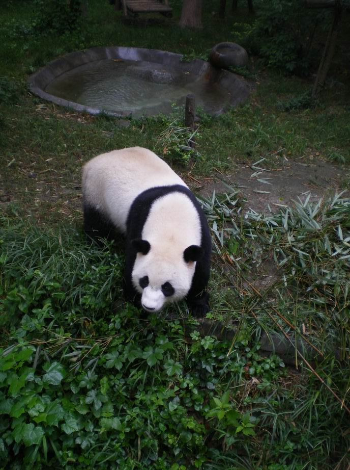 פנדה במרכז הרבייה של הפנדות, צ'נגדו, סין